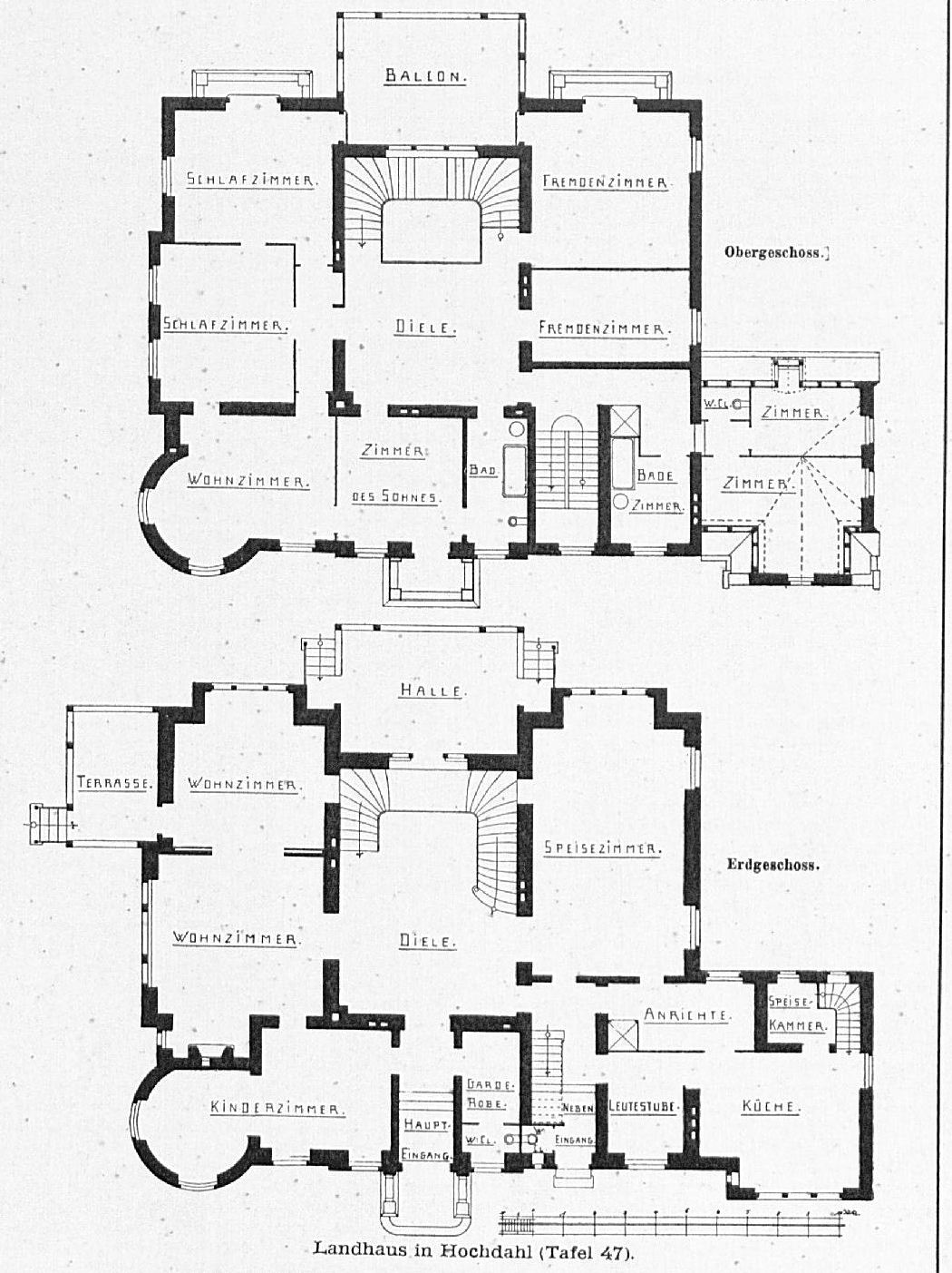 Haus_in_Hochdahl_bei_Düsseldorf_Architekten_Kayser_&_von_Groszheim_Düsseldorf,_Tafel_47,_Grundriss.jpg